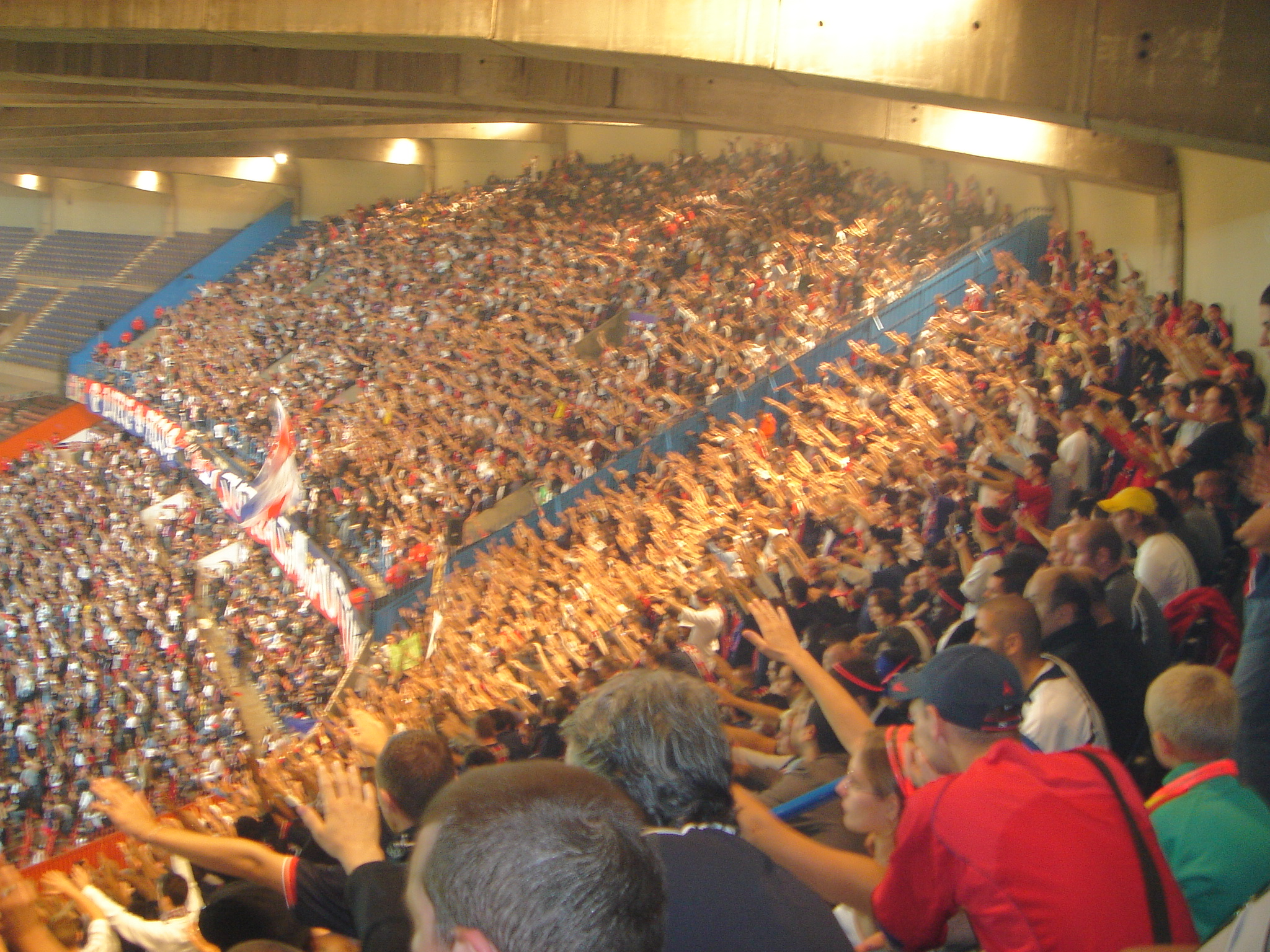 PSG Nancy- 23 septembre 2006